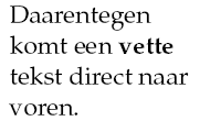 Beschrijving: Voorbeeld van vet, dit springt direct uit de pagina. Lettertype: Palatino (Eigenlijk: URW Palladio), eigen werk.